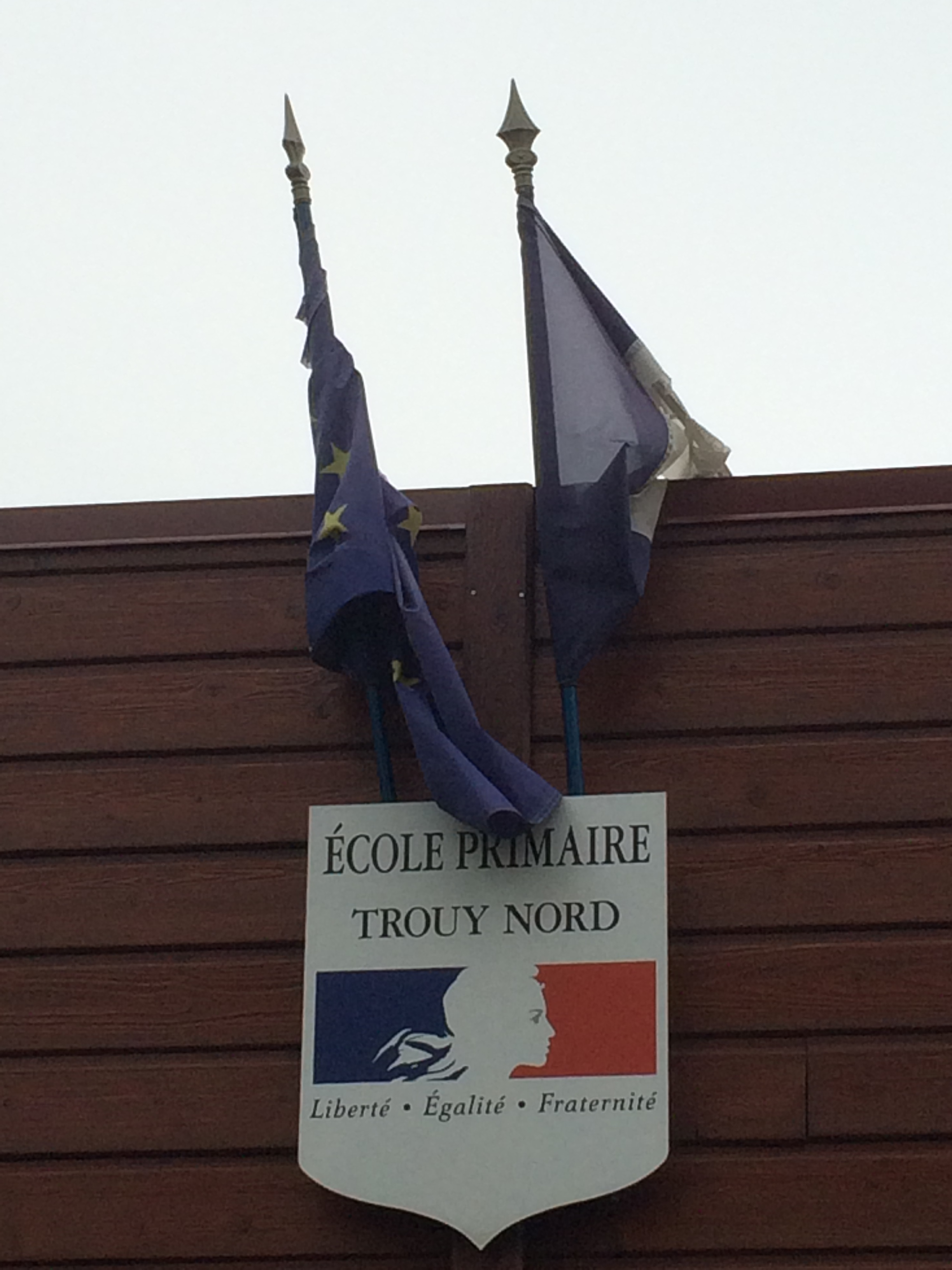 Blason de l'école de Trouy Nord sur la façade du bâtiment